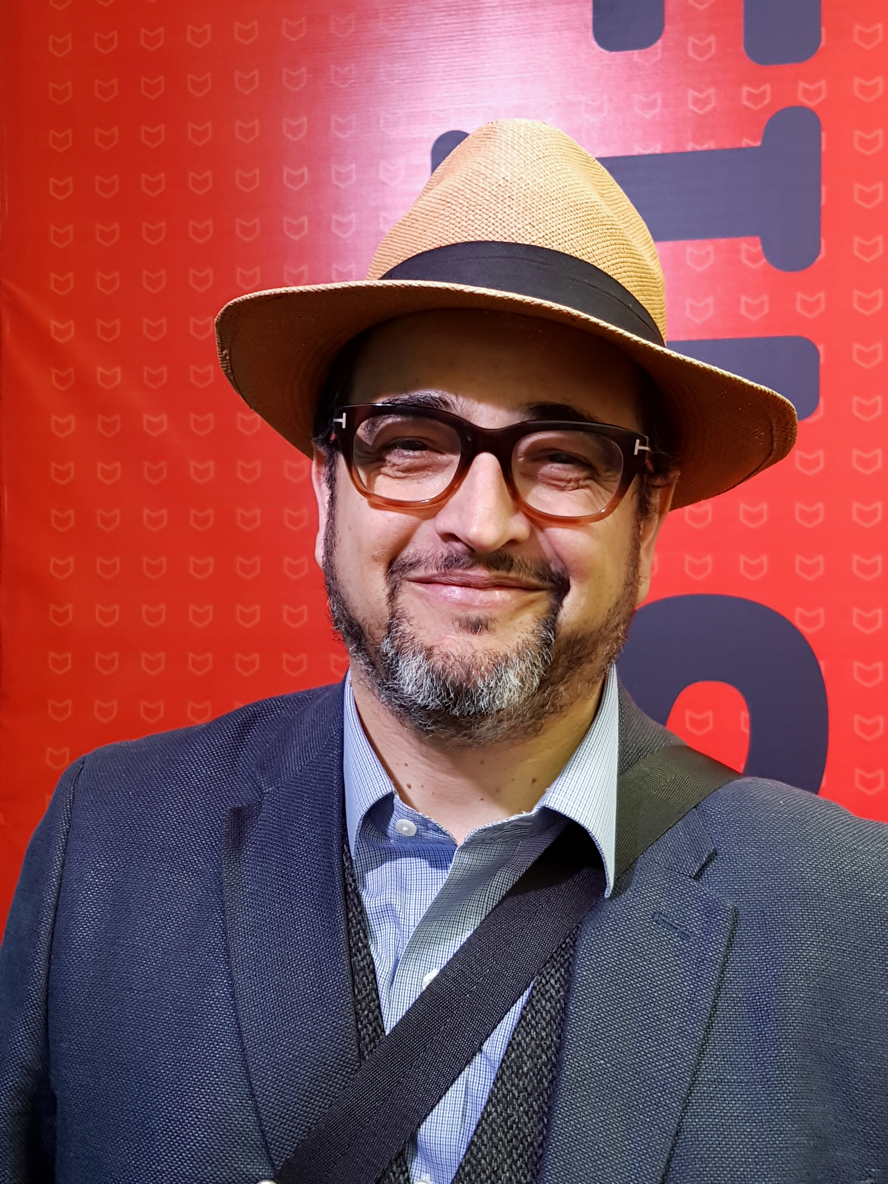 El profesor y artista visual chileno Pablo Chiuminatto en la Feria Internacional del Libro de Santiago 2017.